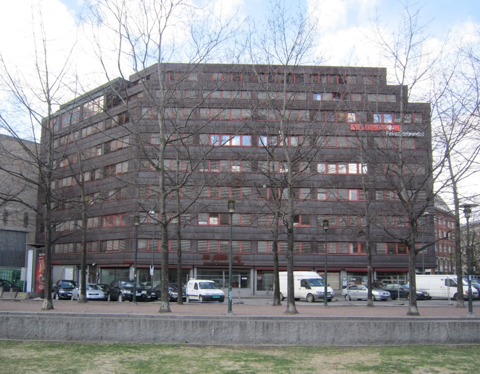 Lilletorget 1 i Oslo